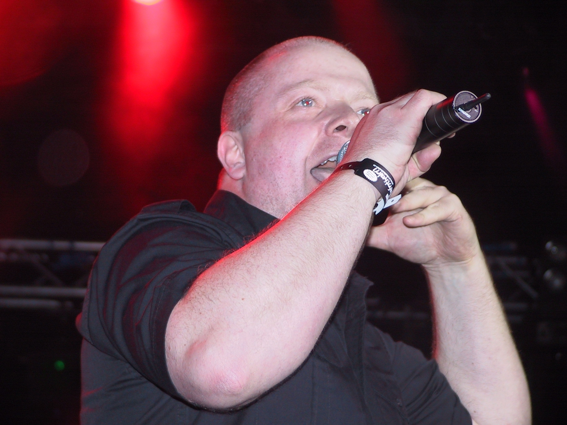 VNV